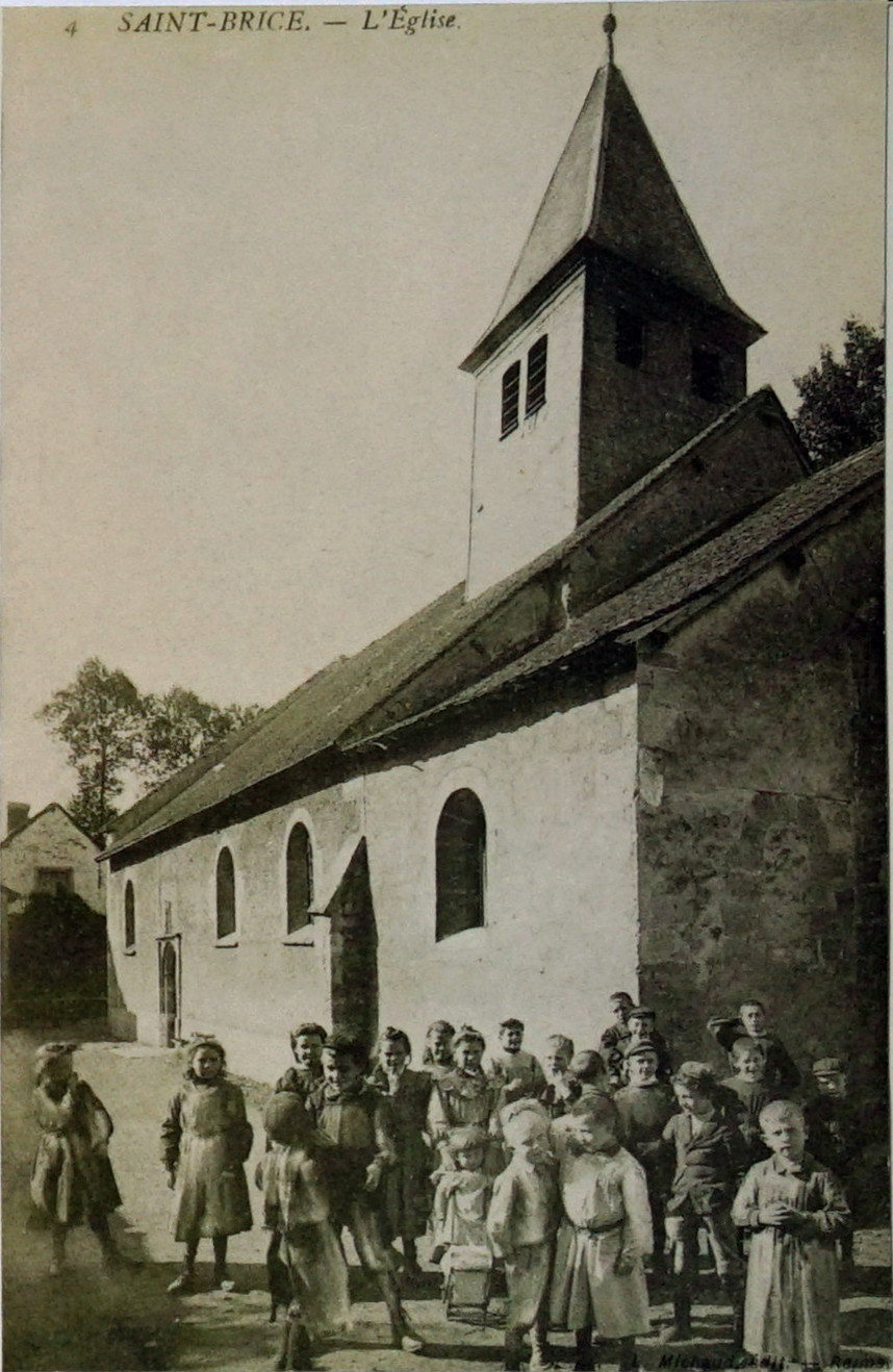 sur une carte ostale du début du XXe siècle.